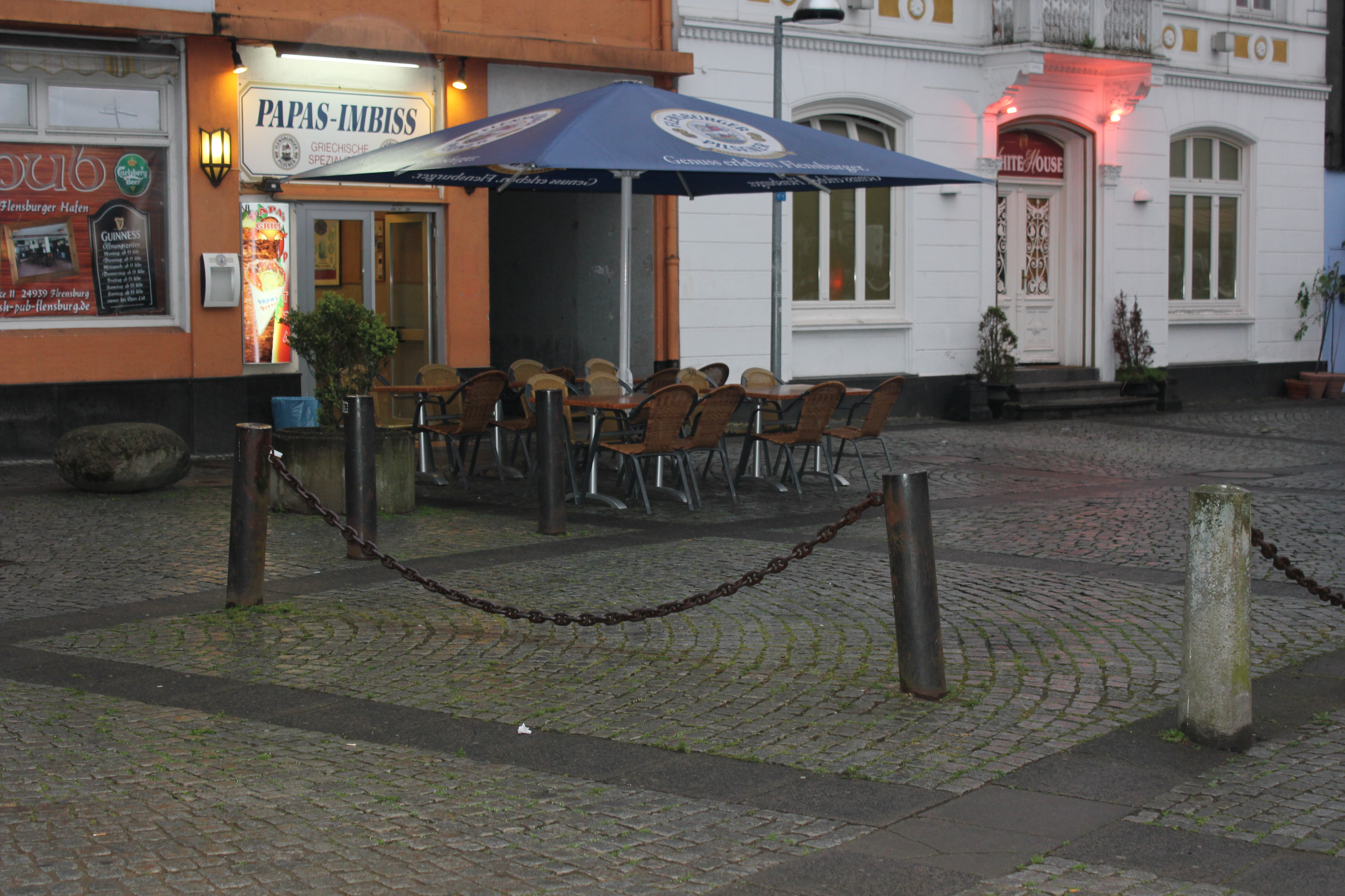 Papas-Imbiss am Schiffbrückplatz (Flensburg 2014), Bild 02